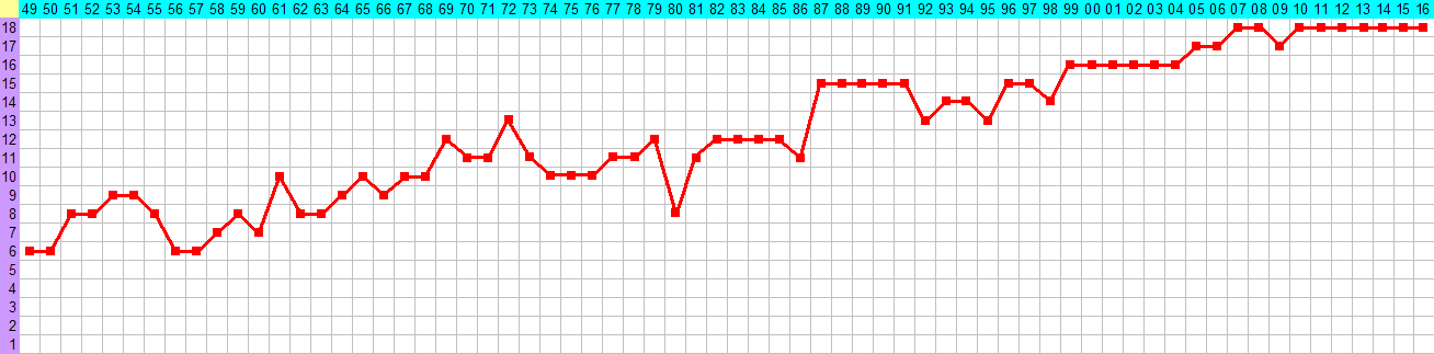 Ilość wyścigów w sezonach MotoGP